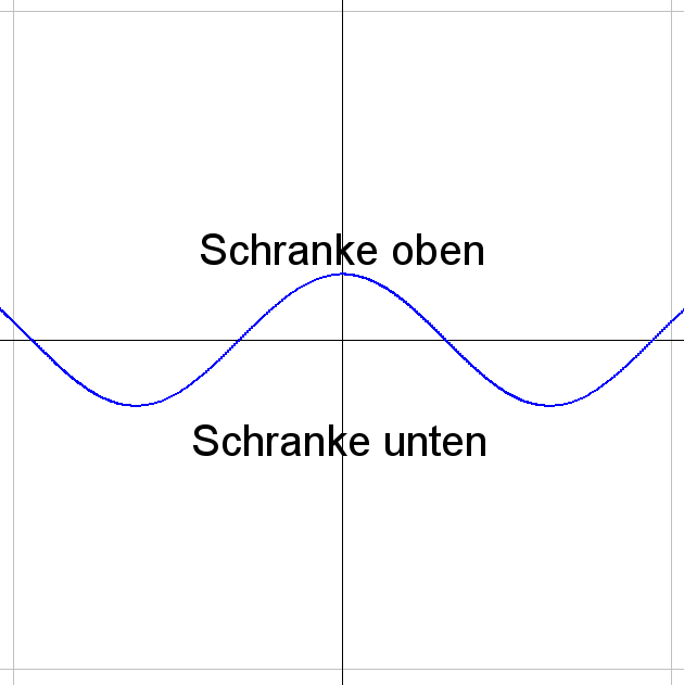 Beschränktheit 1